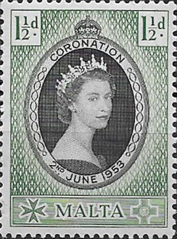 Znaczek Malty z okazji koronacji Elżbiety II 1953